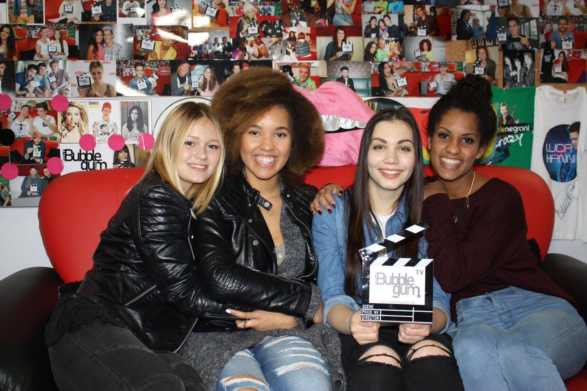 Leandah bei Bubble Gum TV (